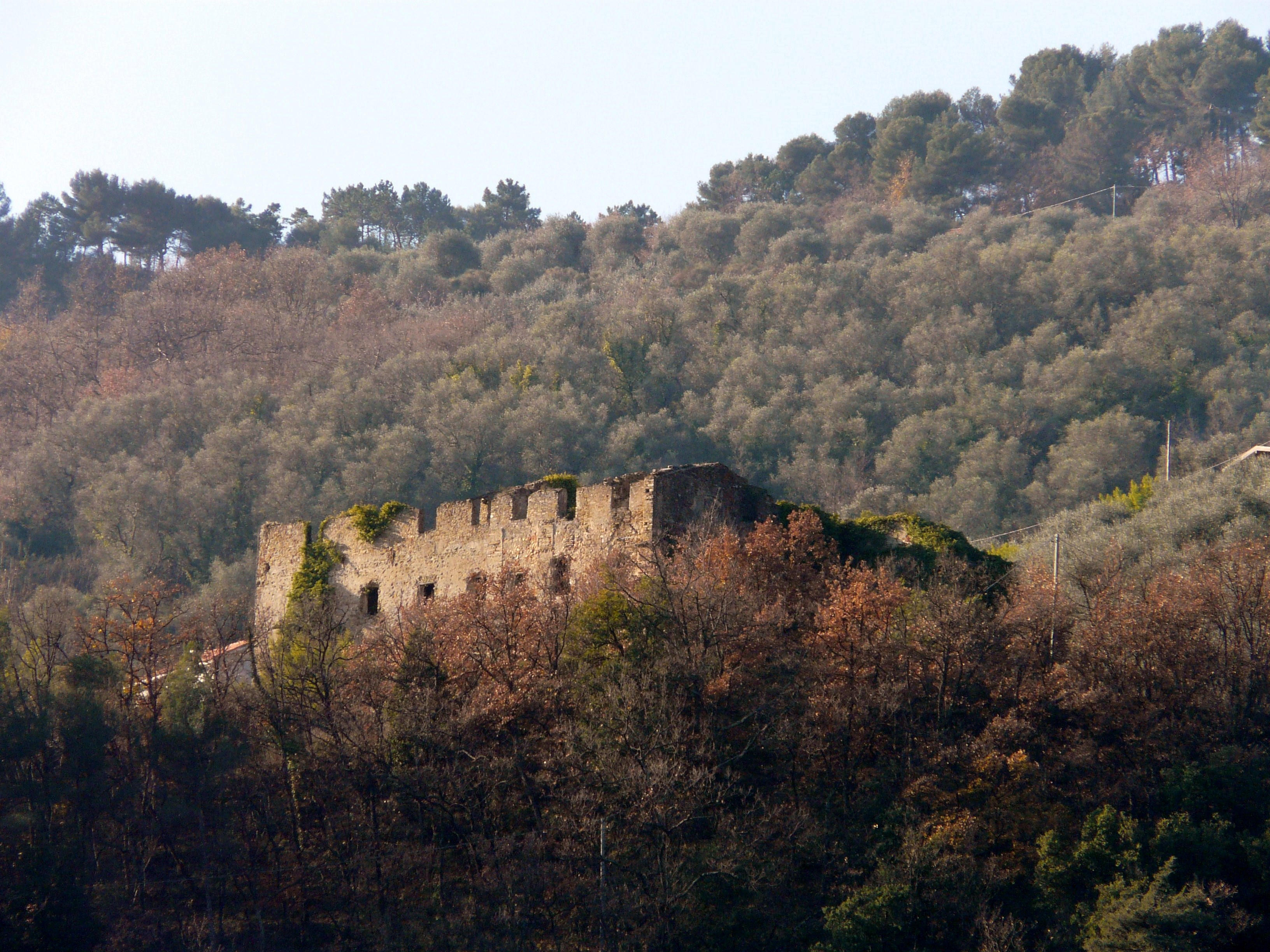 Ruderi del monastero benedettino di Santa Maria della Mota di Dolceacqua, Liguria, Italia